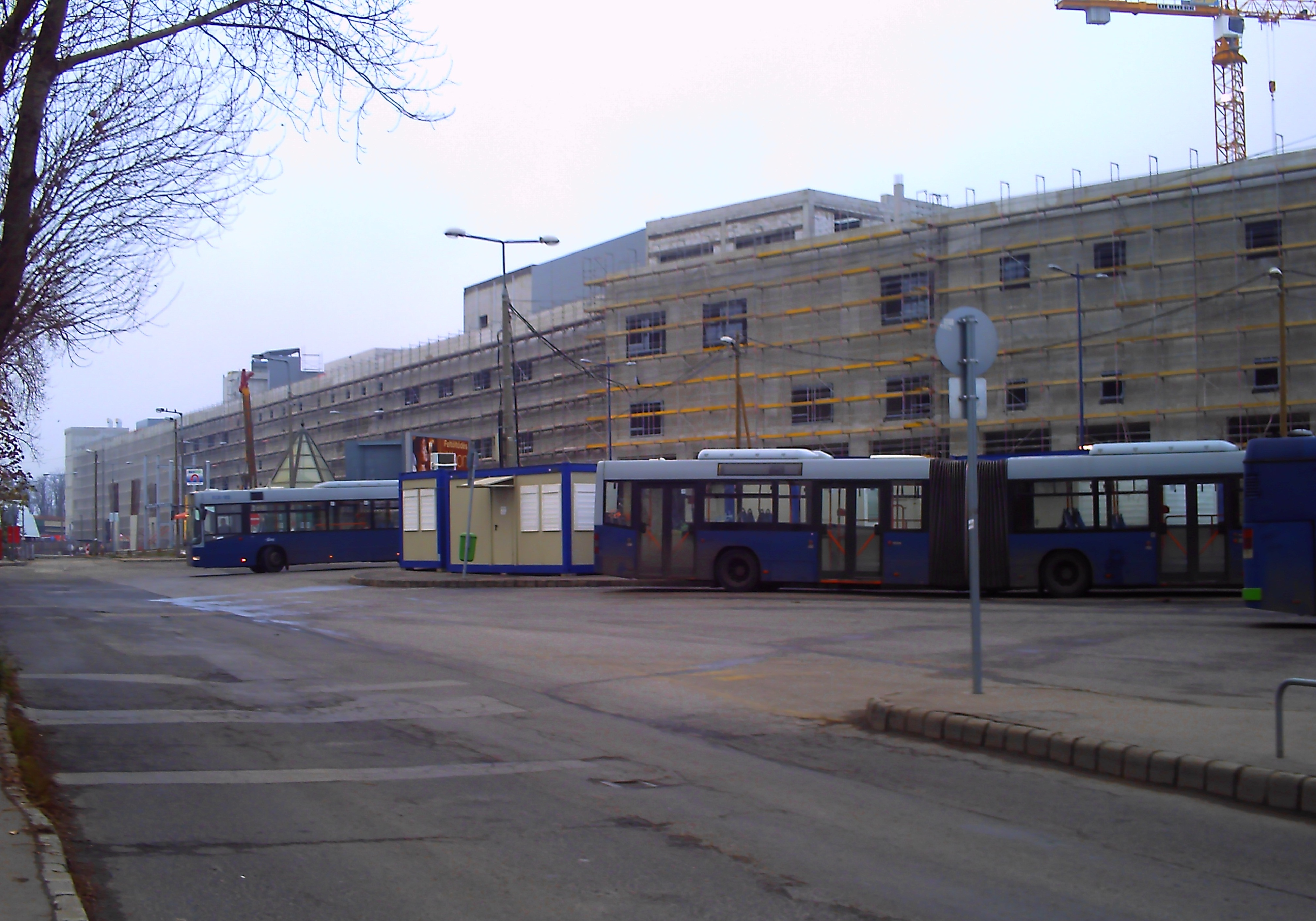 KöKi Terminál bevásárlóközpont építése, az ideiglenes buszvégállomással, 2010. november